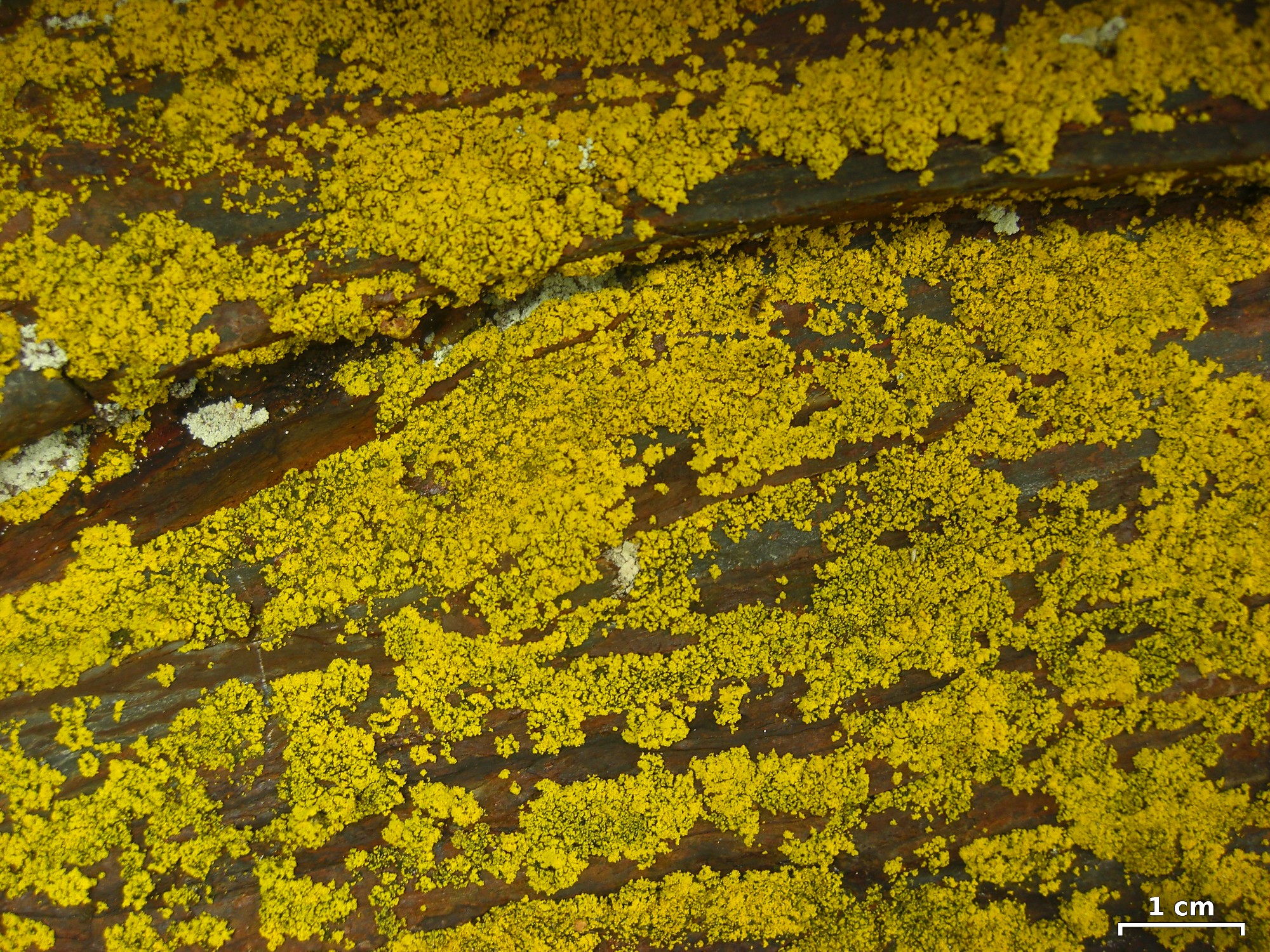 Mount Leconte, Smokies, Tennessee, 20110602